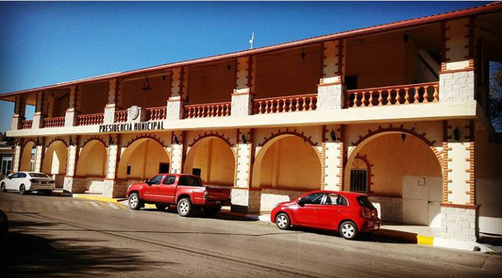 Presidencia Municipal, Guadalupe, Chihuahua.